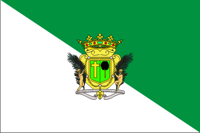 Bandera de Santa Brígida (Canarias)